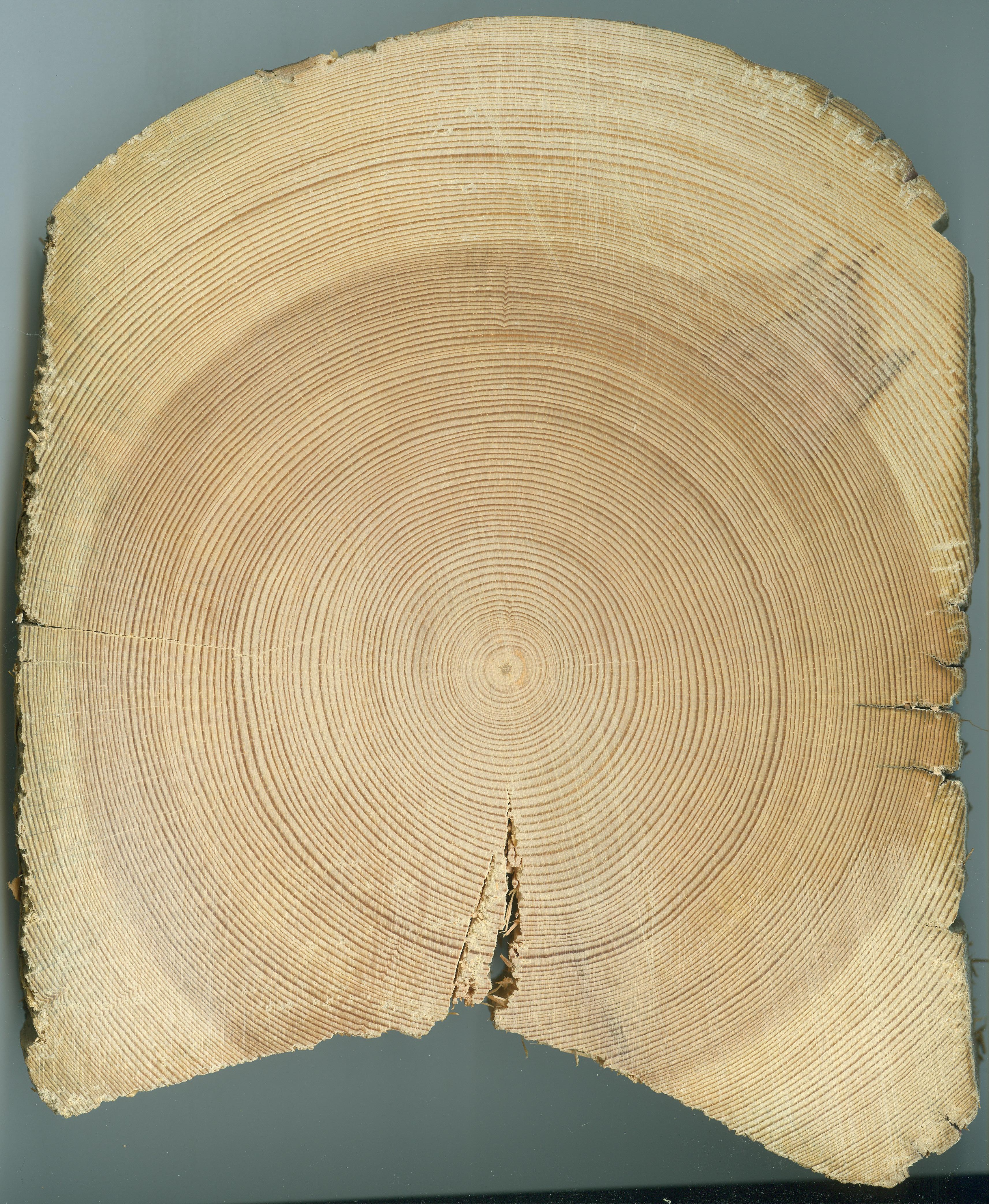 Genomskärning av en väggtimmerstock från ett timmerhus i Dalarna. Trädet fälldes 1861/62, och timringen skedde samma år att döma av virkets kondition och sprickornas utseende. Preparatet är skannat i 600 dpi upplösning och stockens bredd är ca 14 cm.